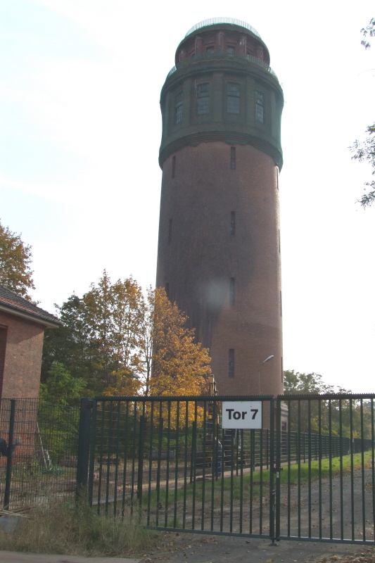 Der Wasserturm in Kirchmöser, das Wahrzeichen des Ortes